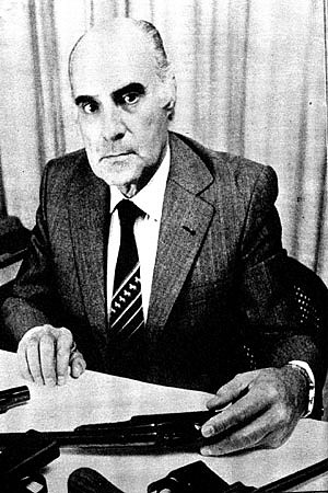 Рамон Хуан Альберто Кампс